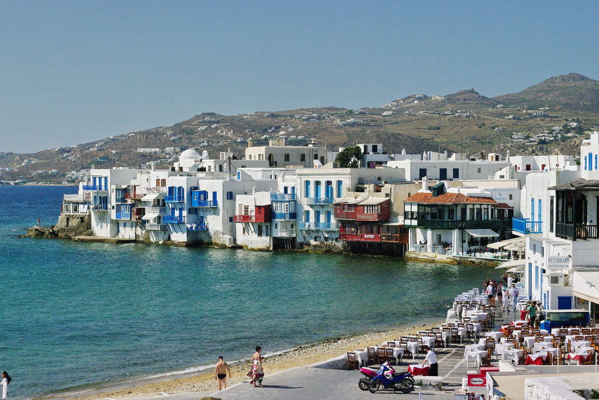 Klein Venedig, Mykonos